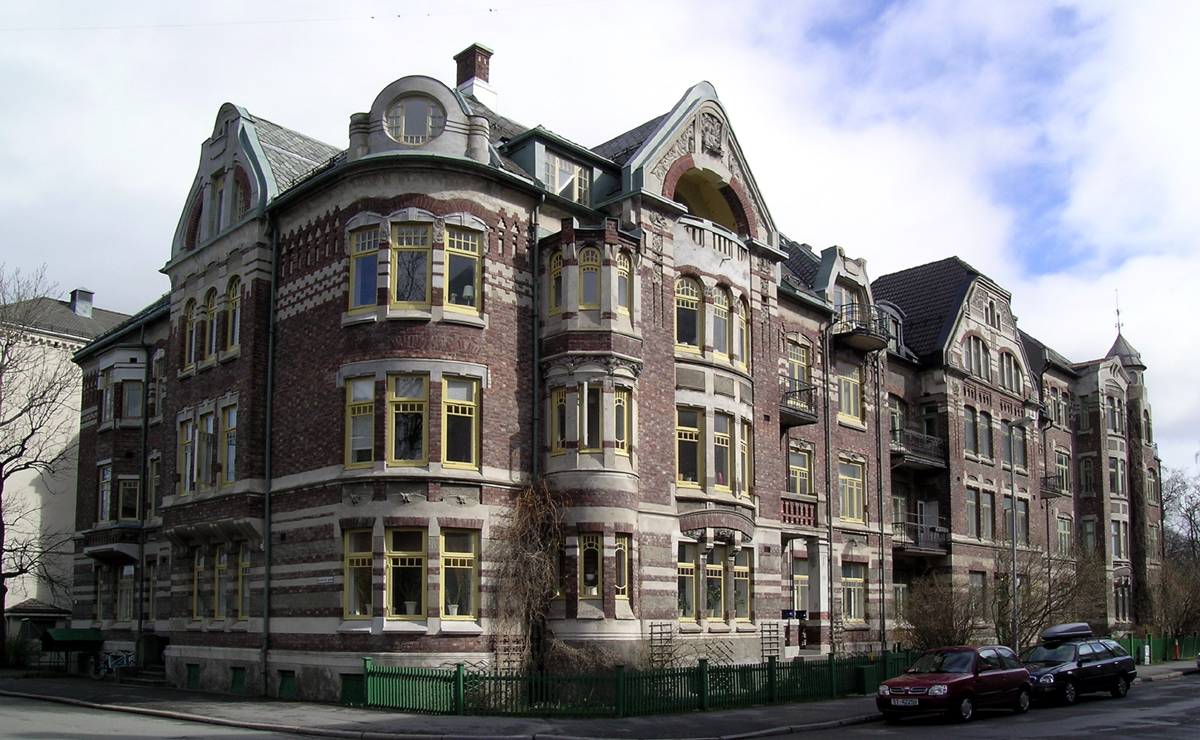 Det engelske kvarter, Arkitekt Christies gate 4, Trondheim. Bygd 1904. Arkitekt: Johan Osness